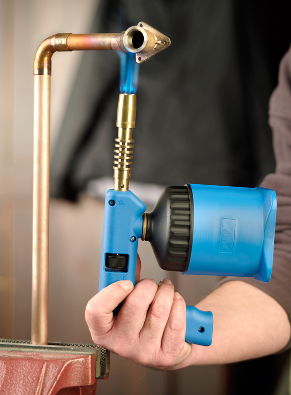 Zu sehen ist eine Lötlampe mit Überkopffunktion beim Löten von Kumpferrohren